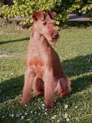 Irish Terrier „Amelie“